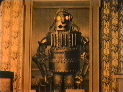 Description